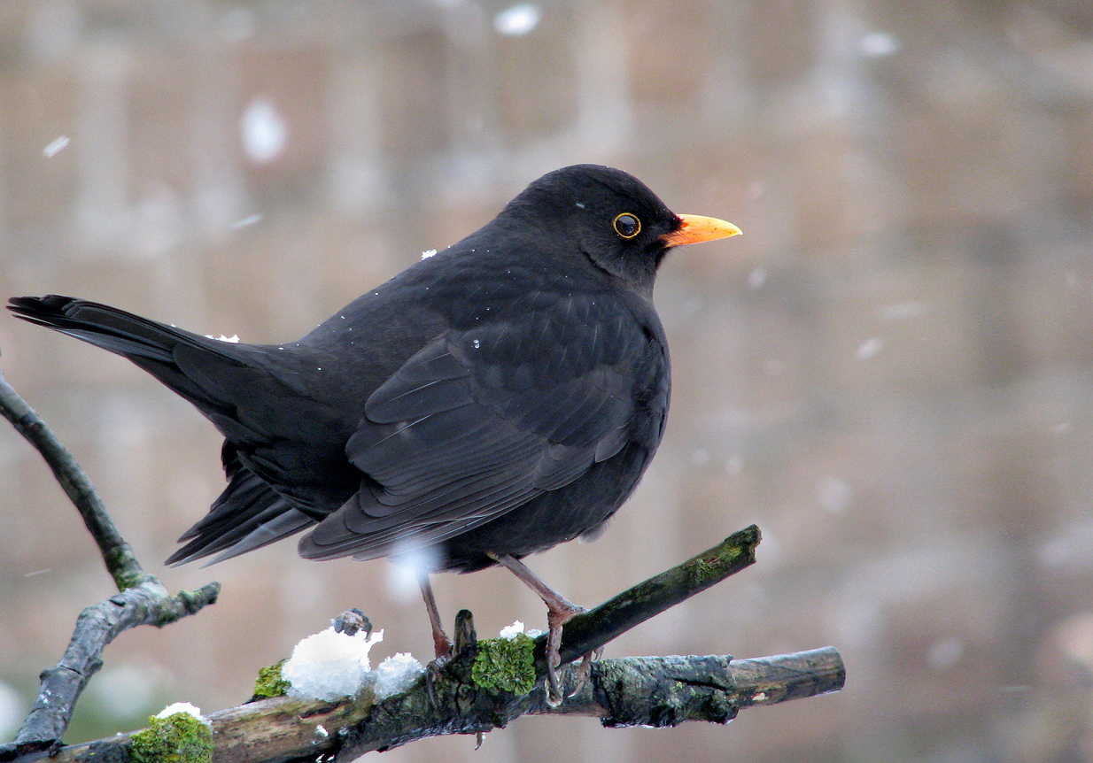 Koltrast hane, med tydlig orbitalring.